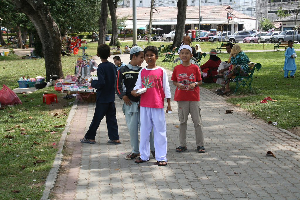 Malay Muslims in Songkhla